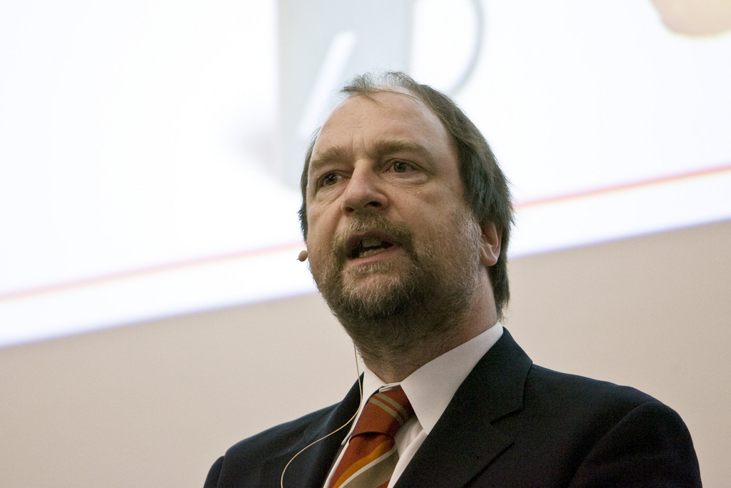 Internet of Things im Swissotel Oerlikon ZH, 27./28.03.2008